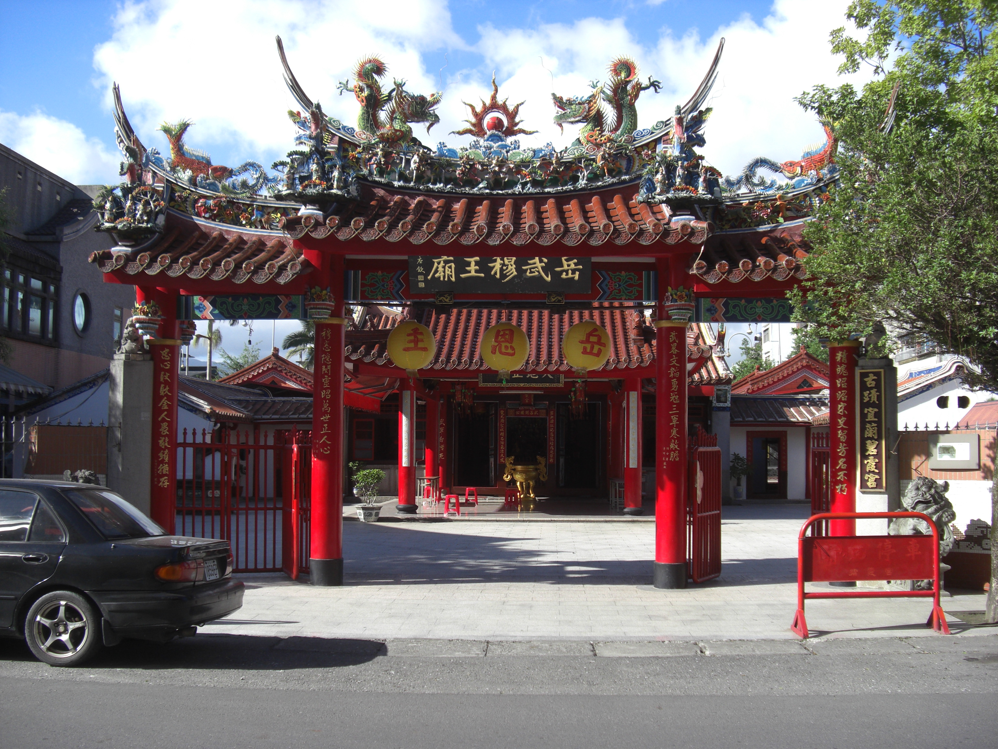 台灣宜蘭縣定古蹟（三級古蹟）- 碧霞宮